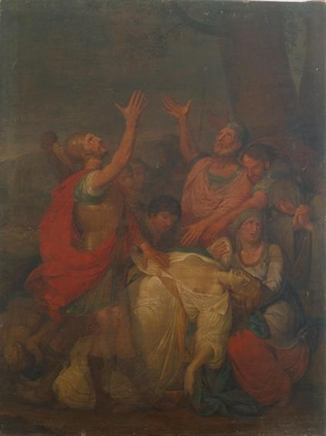 José Teixeira Barreto, (1763-1810) Juramento de Viriato Séc. XVIII-XIX Óleo sobre tela 130,2 x 98,3 cm Museu Nacional de Soares dos Reis